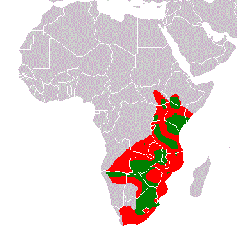 Range Map Plains Zebra.